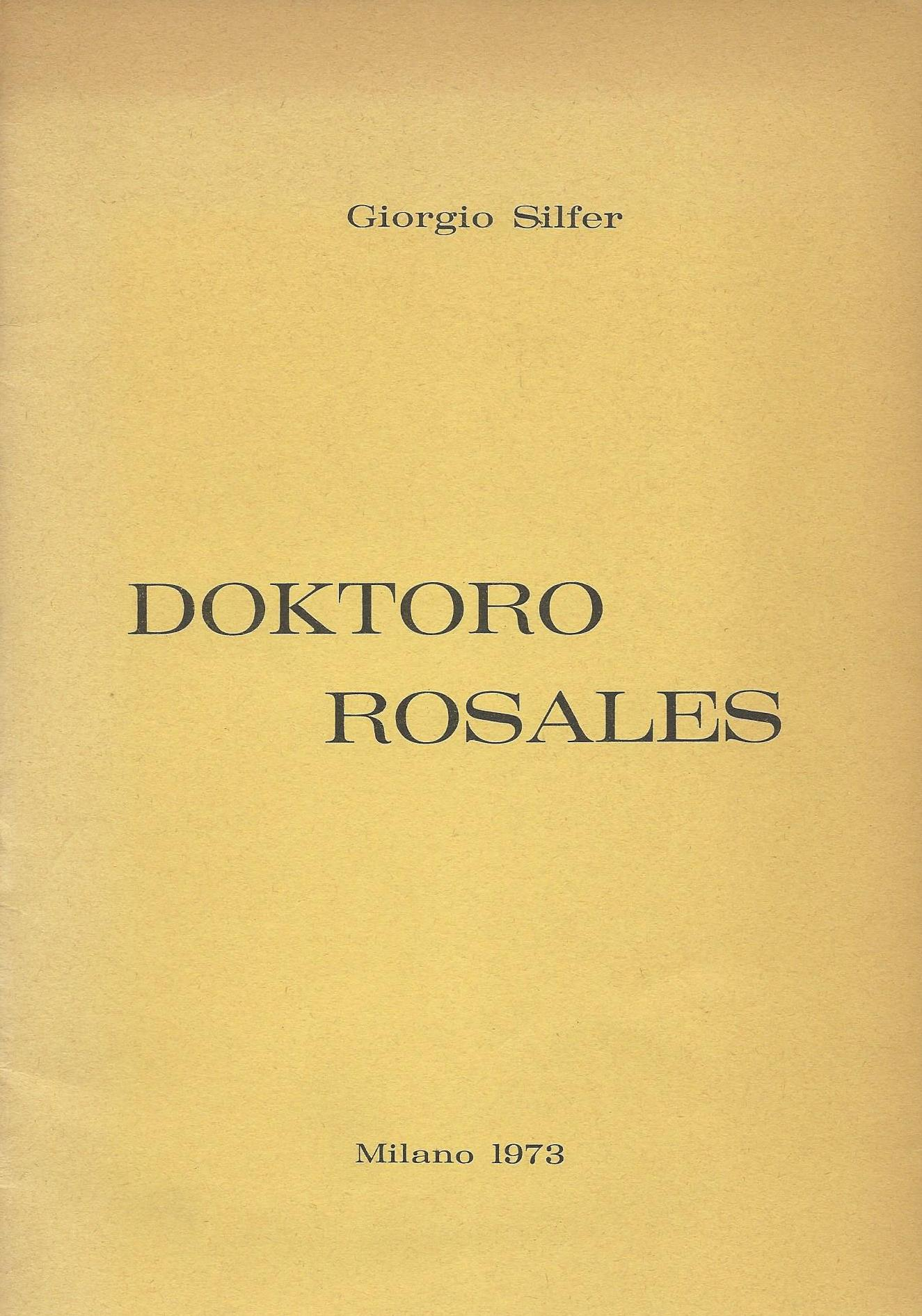 librokovrilo de libro "Doktoro Rosales", 1973